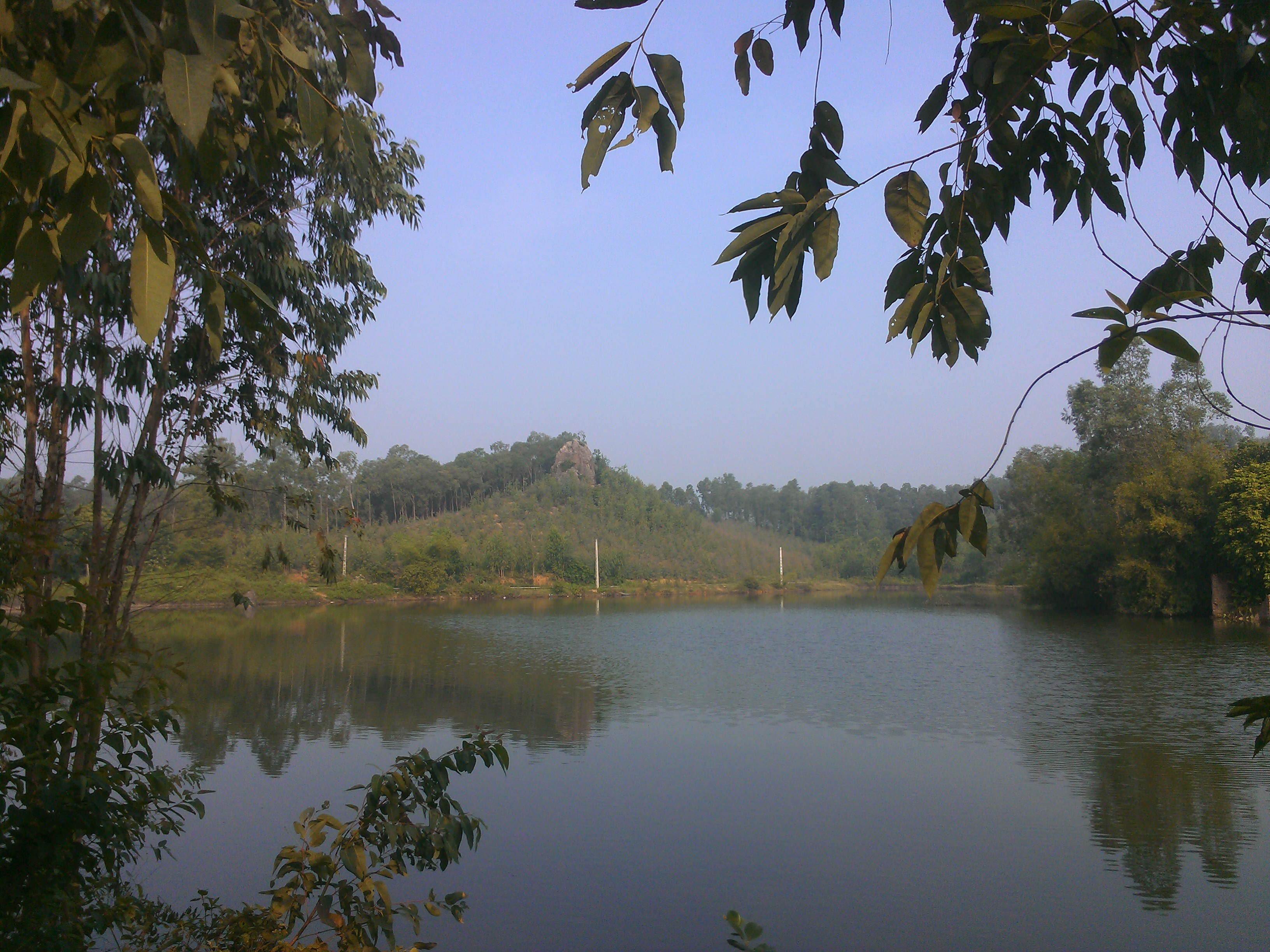 Trên đỉnh núi có khối đá lớn, biểu tượng của xã Lập Thạch xưa, cũng là biểu tượng của huyện lập Thạch xưa. Nơi đây ba nhà giáo dạy con vua Lý Thái Tổ chọn làm nơi mở trường lớp dạy học cho dân. Sau đó các Ngài thác, hóa đá tại đây. Nhân dân lập đền thờ cầu đảo rất linh ứng. Triều Lý phong tặng các Ngài là Tam vị Thạch Sơn Đại vương. Triều Trần phong tặng các Ngài là Thượng đẳng thần, đền thờ các Ngài là Tối Linh Từ.